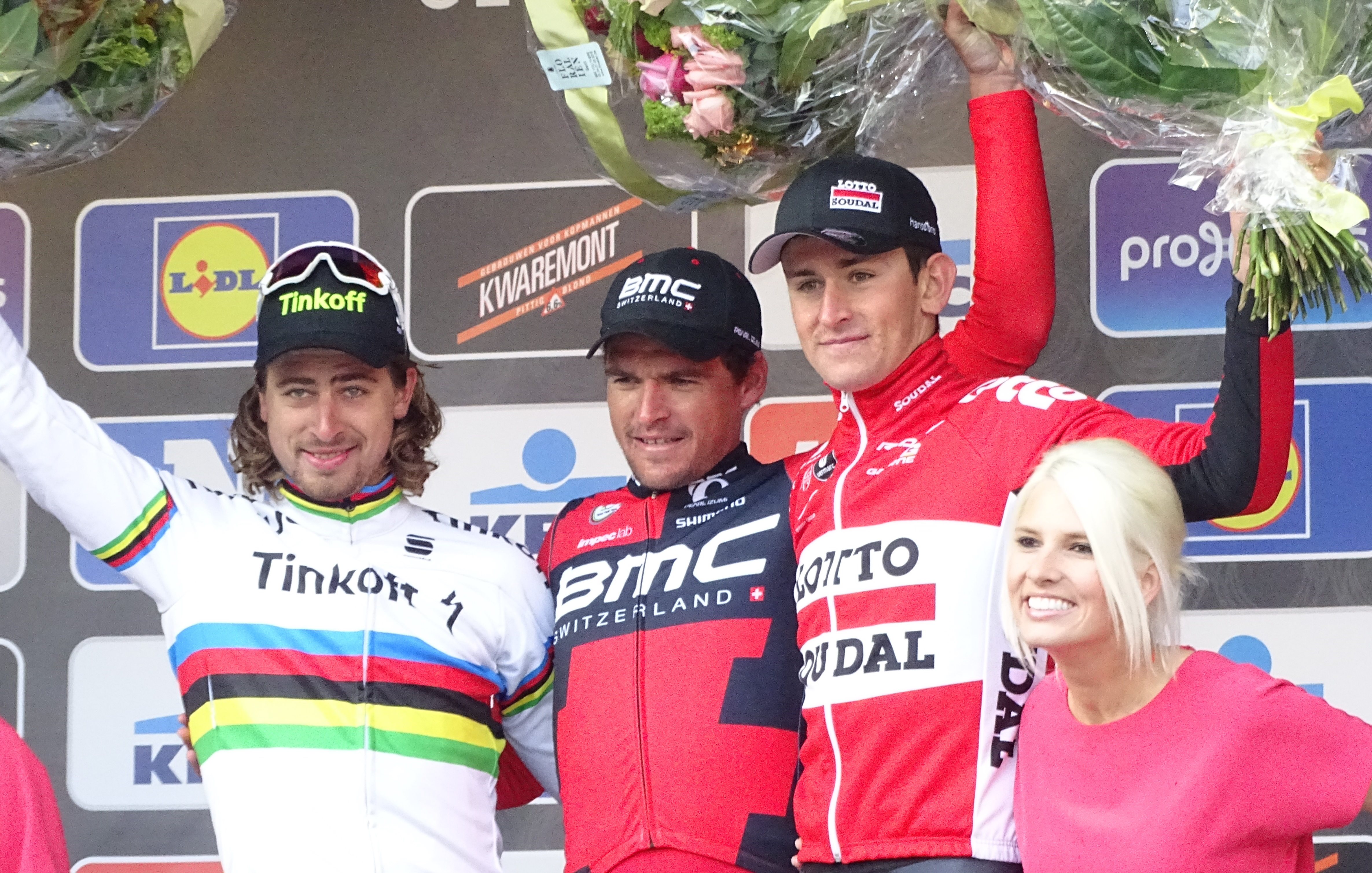 Reportage réalisé le samedi 27 février à l'occasion du départ et de l'arrivée du Circuit Het Nieuwsblad 2016 et de l'arrivée du Circuit Het Nieuwsblad féminin 2016 à Gand, Belgique.